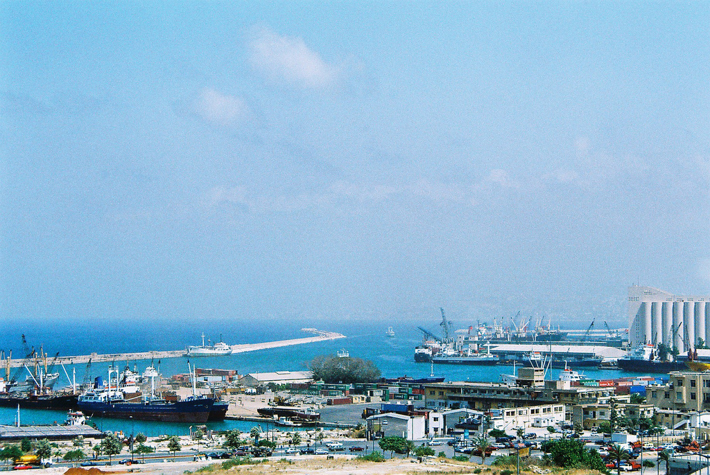 Beirut / Libanon 2003